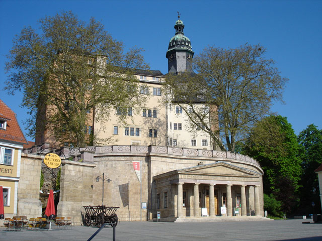 Schloss Sondershausen aus Sicht Rathaus/Markt